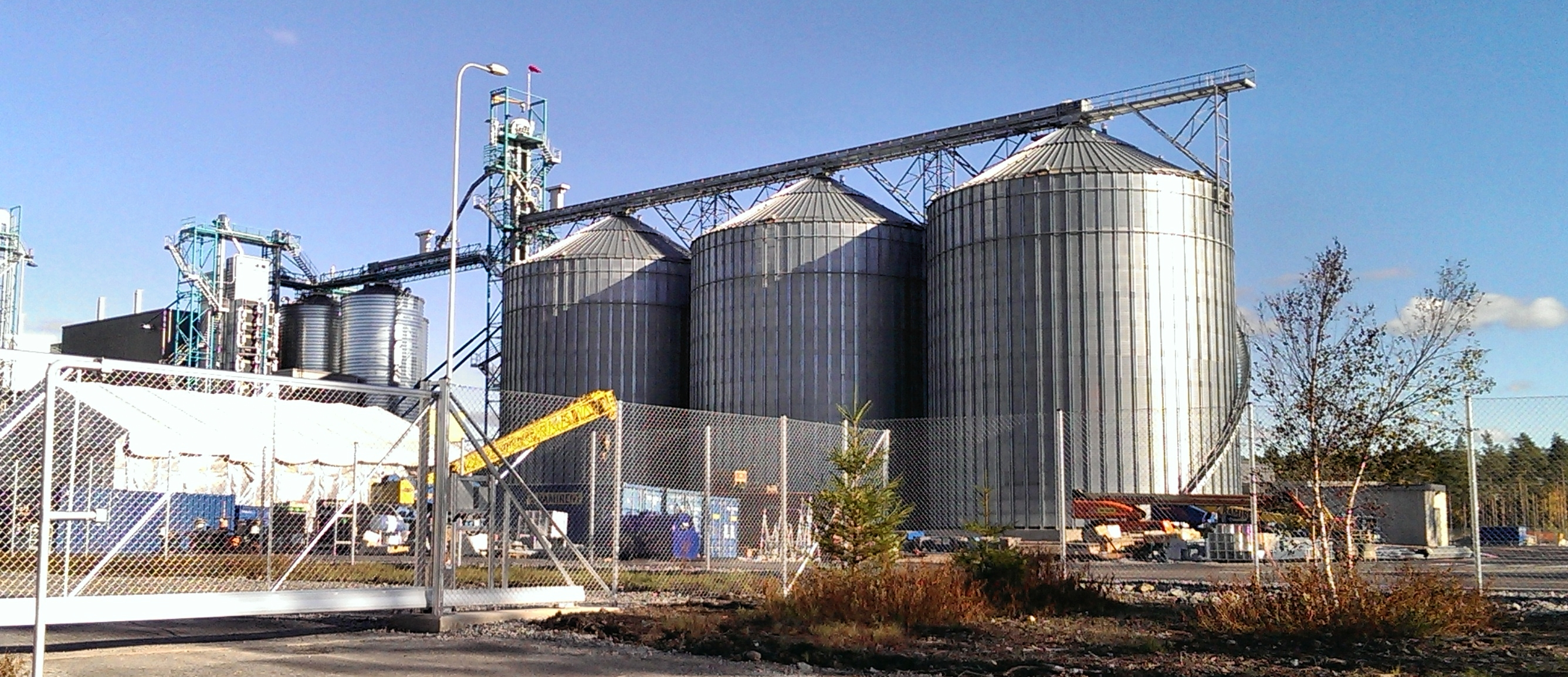 Uudenkaupungin soijatehdas 2013